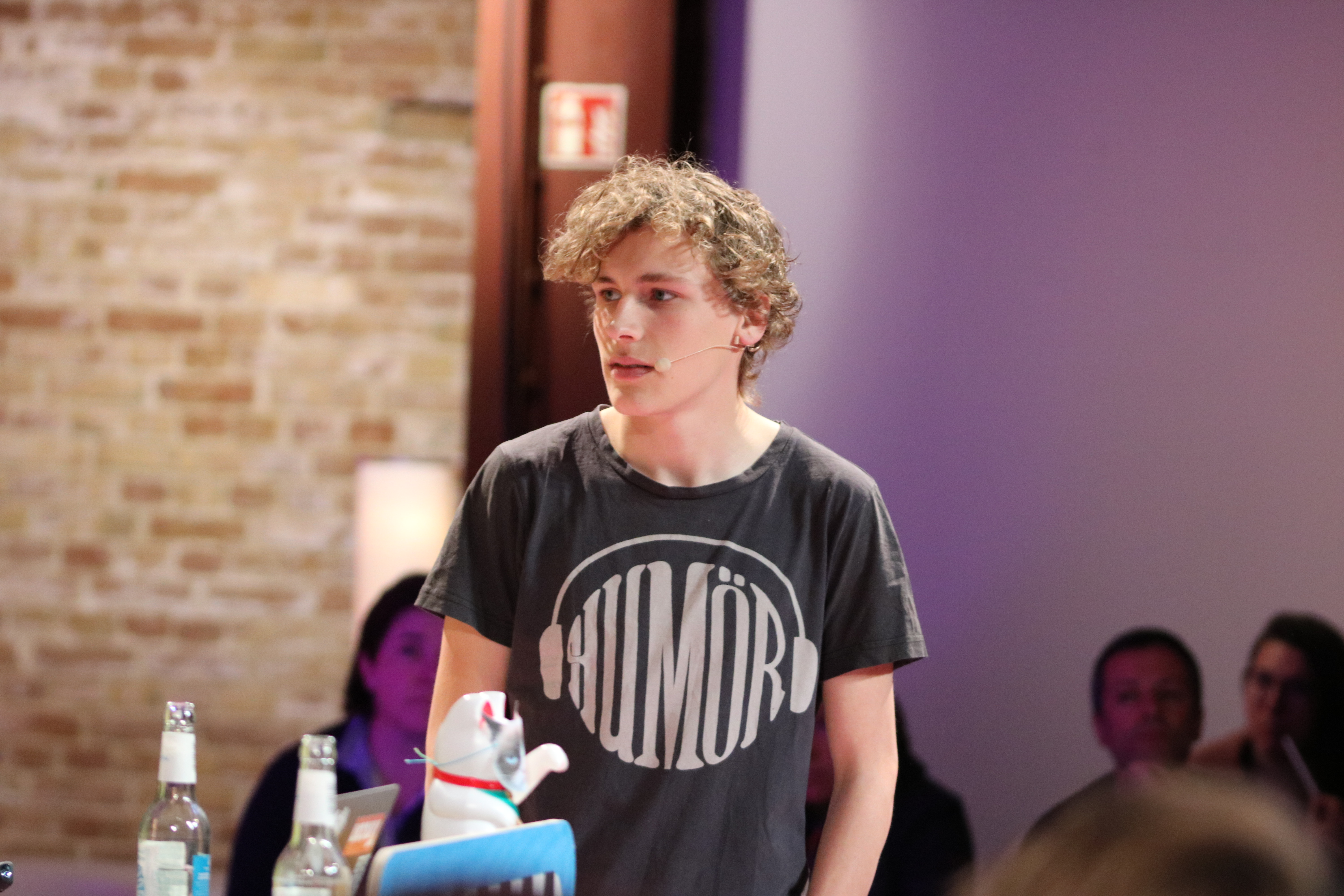 Jakob Blasel (* 2000) ist ein deutscher Klimaaktivist. Hier auf der auf der TINCON @ re:publica 2019